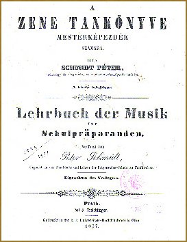 Schmidt Péter: A zene tankönyve mesterképedzék számára.